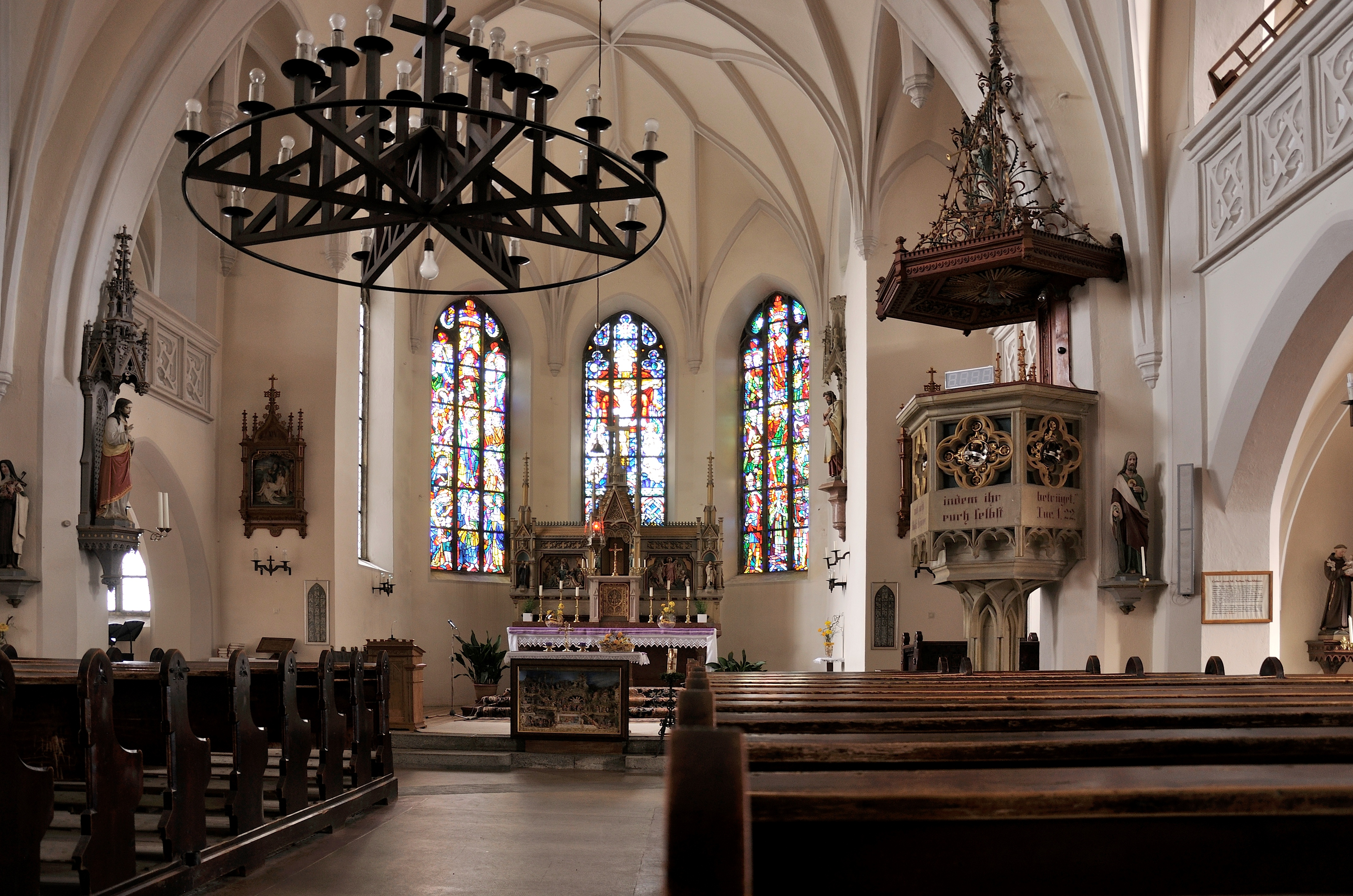 Kath. Pfarrkirche hl. Apostel Jakobus